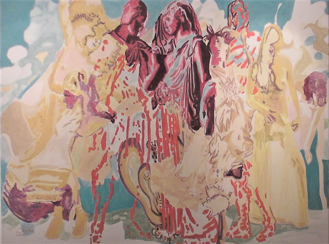 Flow Art mit kulturhistorischem Hintergrund